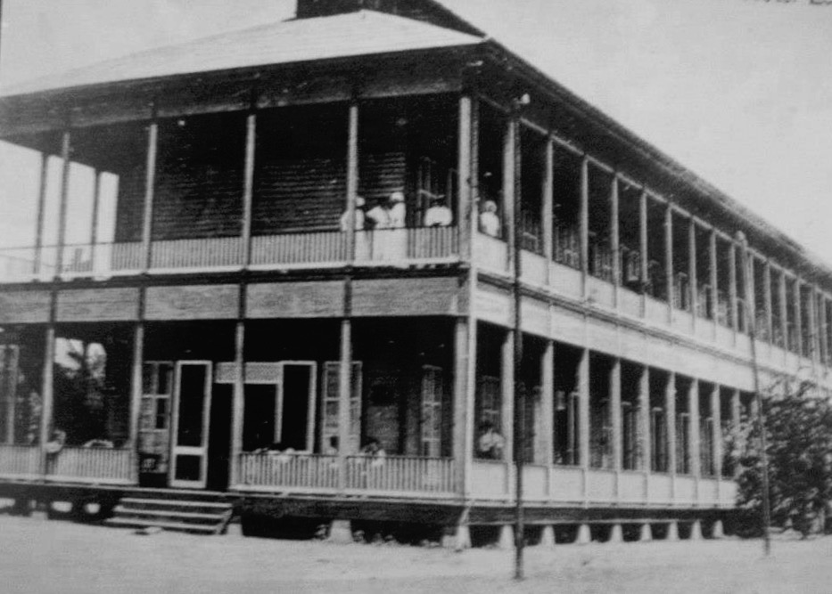 Hotel del Ferrocarril en Zacapa en 1920.